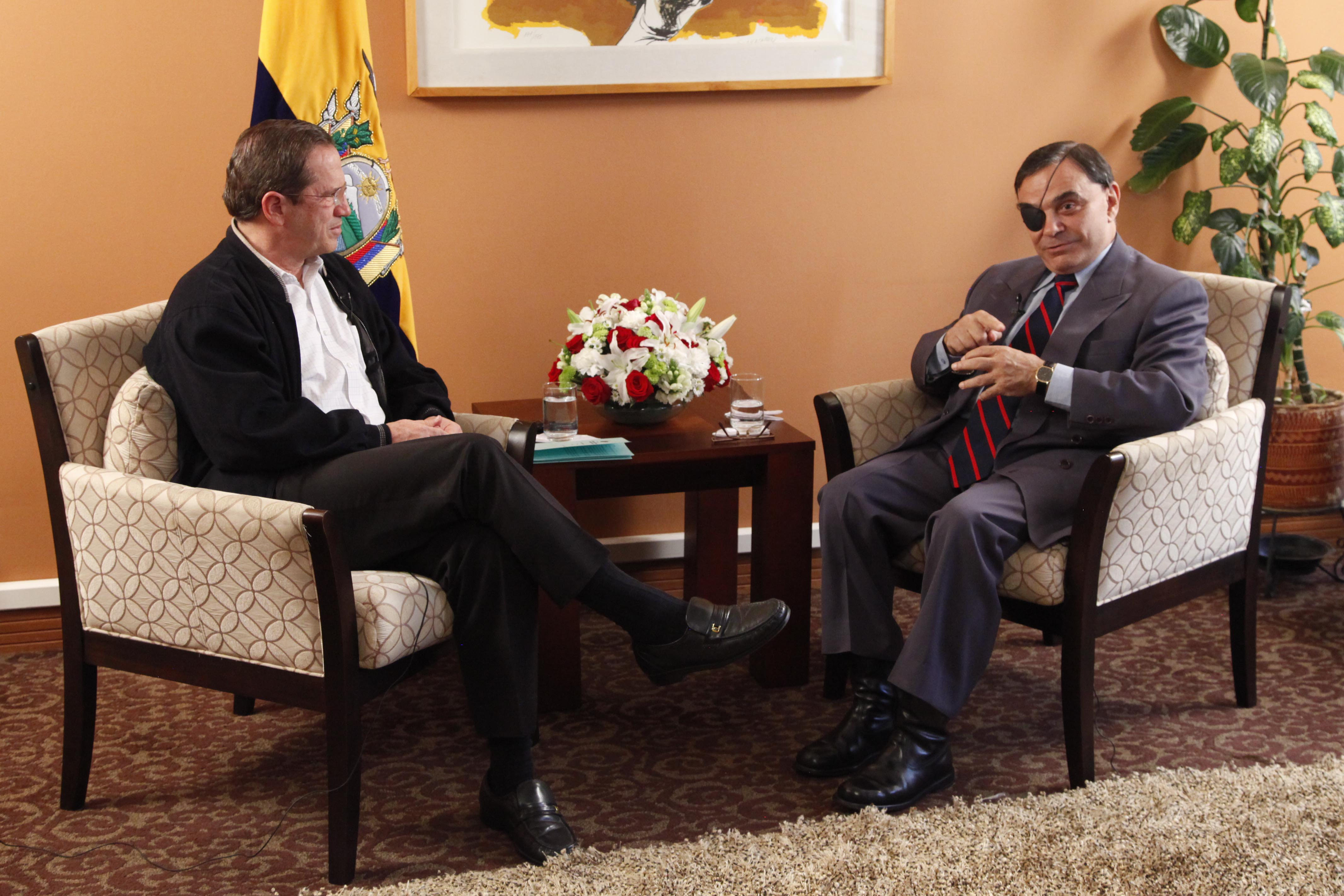 Quito (Ecuador), 05 de Diciembre 2013. Canciller Ricardo Patiño fue entrevistado por Walter Martínez conductor del programa de análisis Dossier. Foto: Xavier Granja Cedeño - Cancillería del Ecuador.